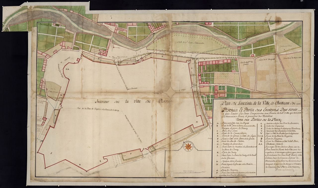 Plan de l'enceinte de la ville et château de Pézenas datant de 1746-1749